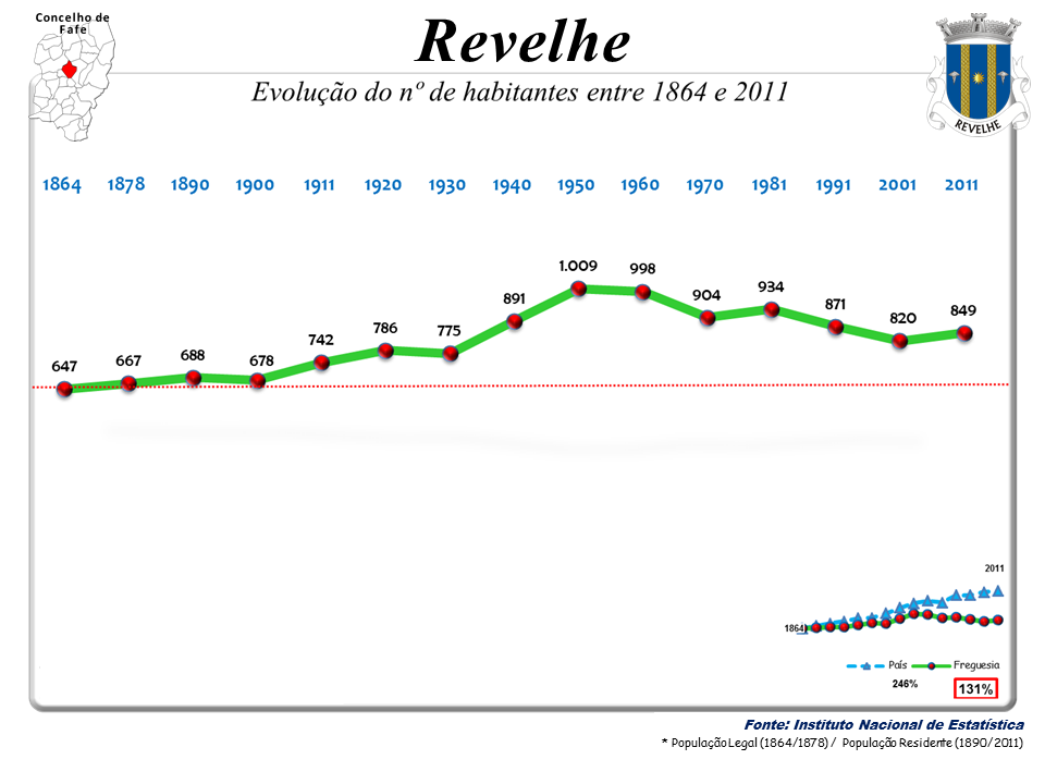 Censos 1864/2011